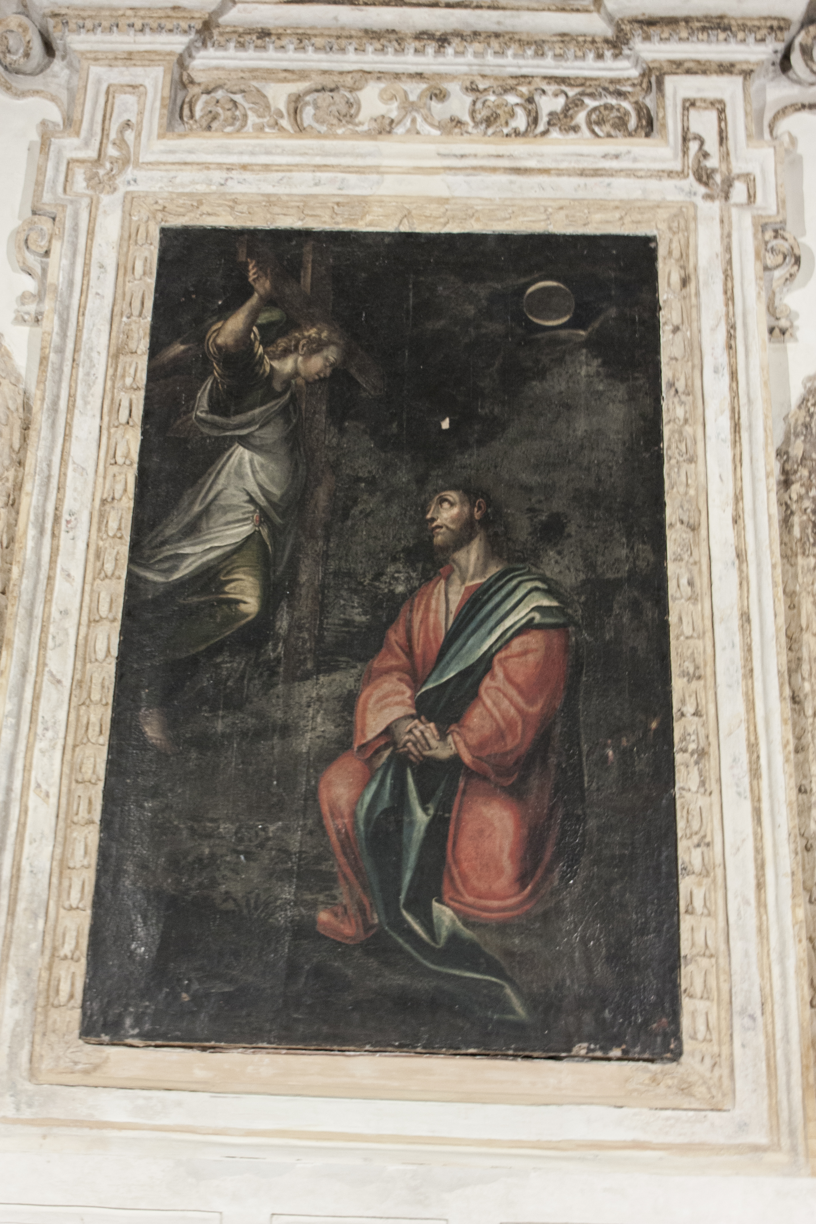 Cristo orante nell'orto del Getsemani - Orazio Ferraro fine XVI inizio del XVII secolo cm 210x124,5 olio su tela presso Cappella Ferraro